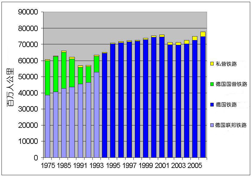 PersonenVerkehrsleistung der Eisenbahnen in Deutschland bis 2006